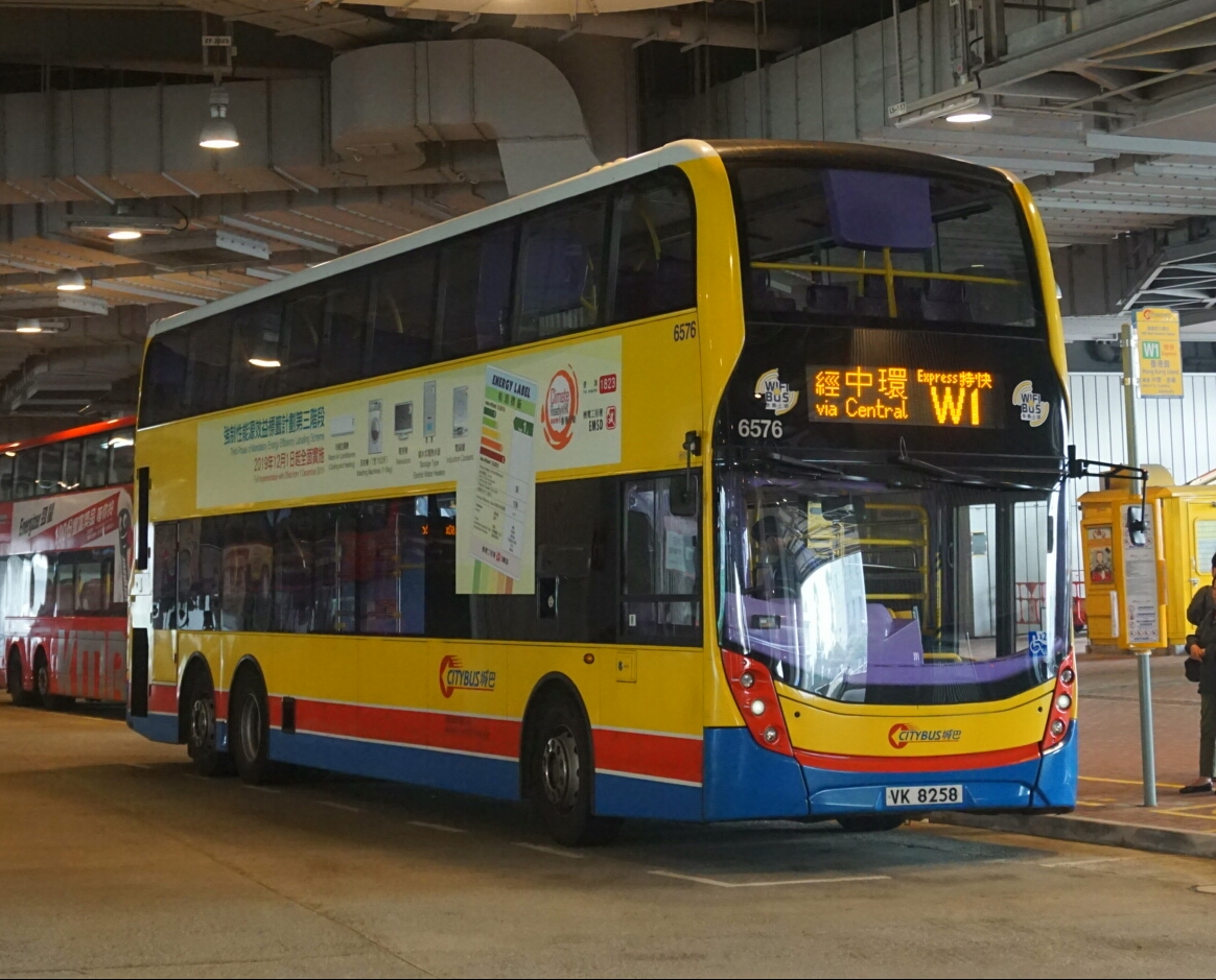 中文（香港）: 過海隧道巴士W1線，正在西九龍站準備開出